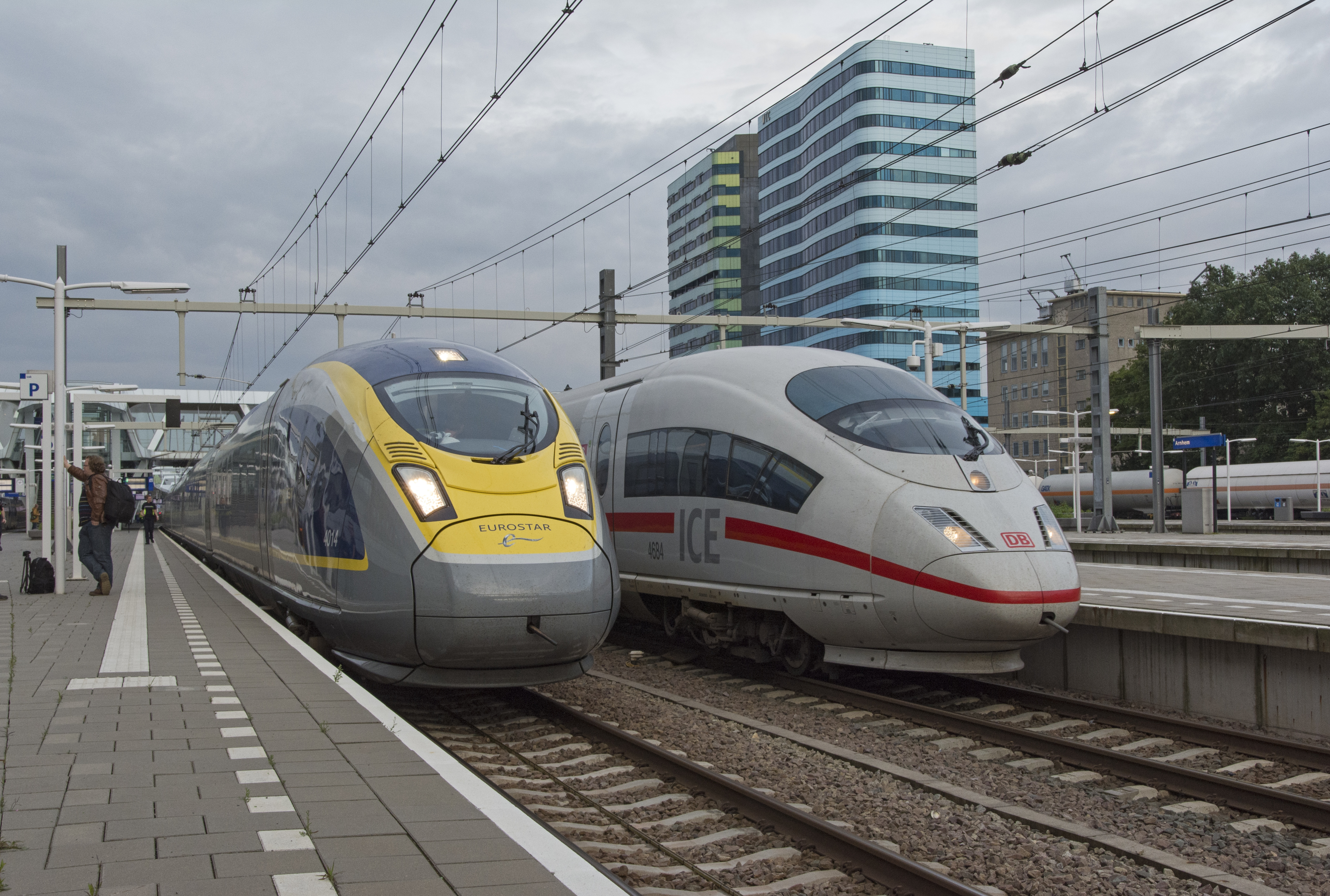 ICE International 104 uit Basel gereden door ICE3m 4684 vertrekt op het spoor naast Eurostar 4013-4014, die klaarstaat voor een volgende proefrit richting Ede-Wageningen.